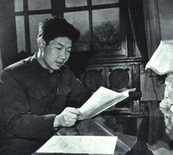 1965-3 1965年 帕巴拉·格列朗杰